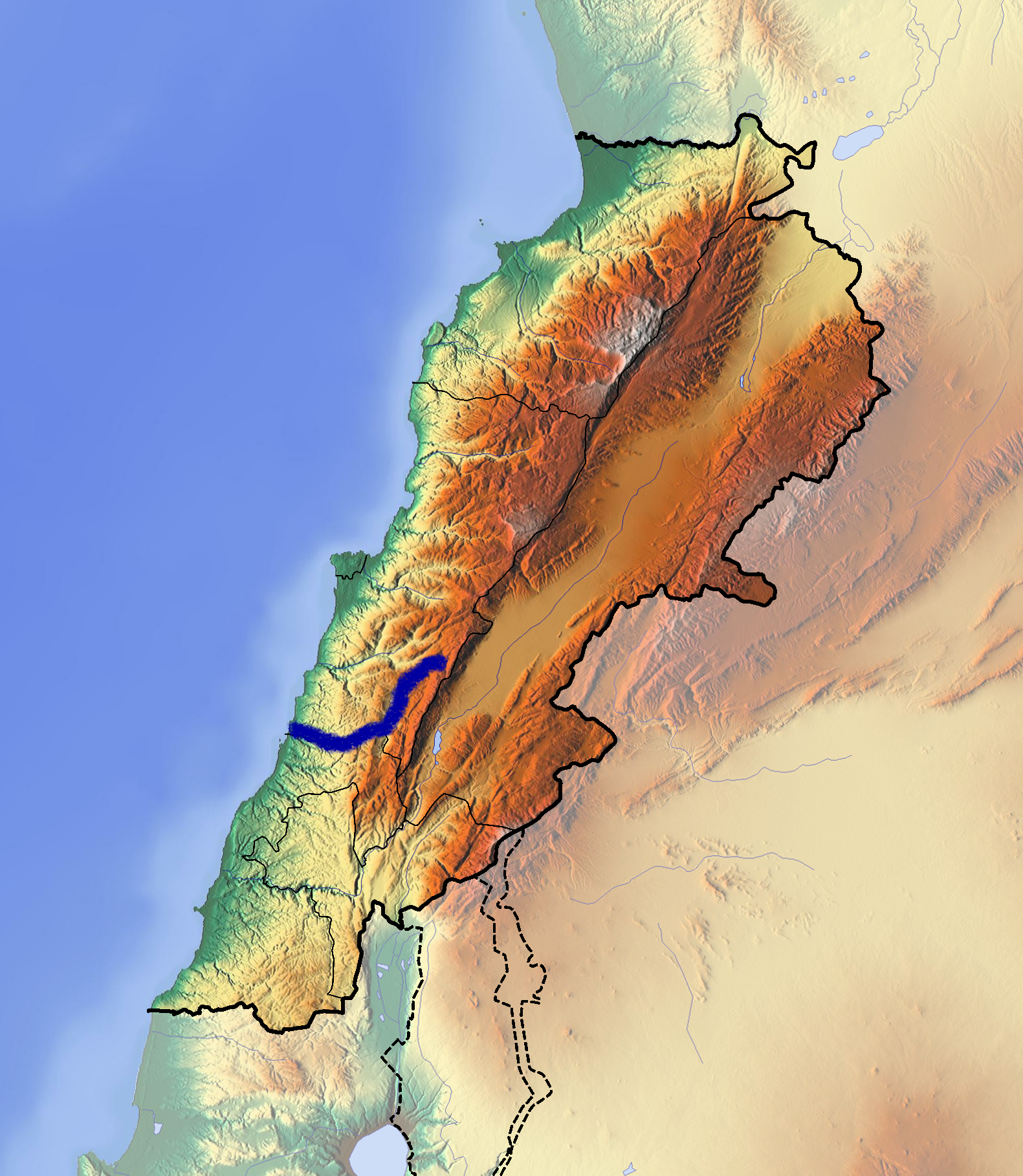 תוואי נהר אל-אוואלי. מקור:File:Lebanon location map Topographic.png